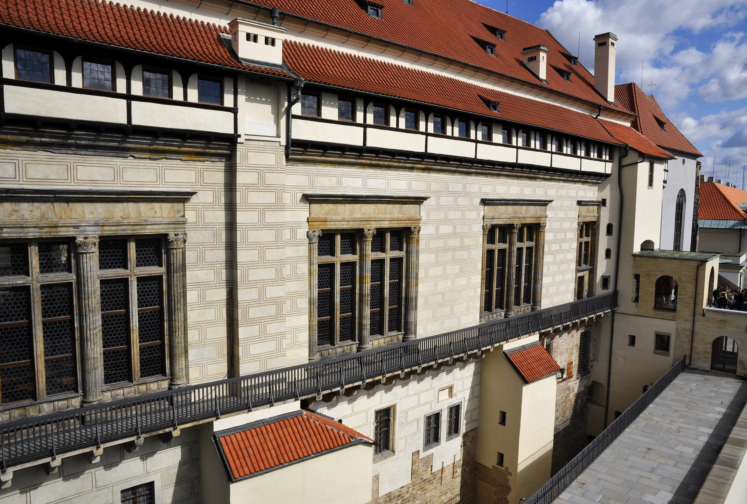 Pražský hrad, Hradčany.